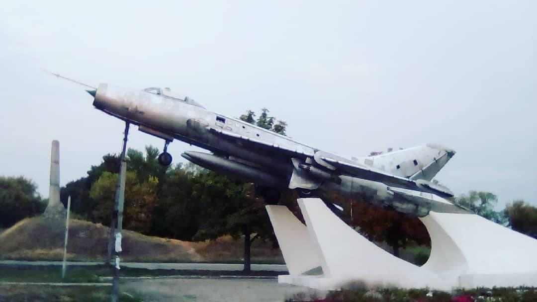 Памятник авиации — самолёт Су-7Б в центре города